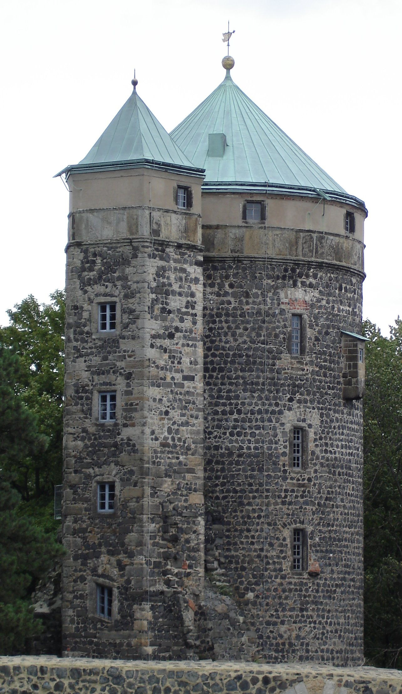 Burg Stolpen, Johannisturm (auch Coselturm)